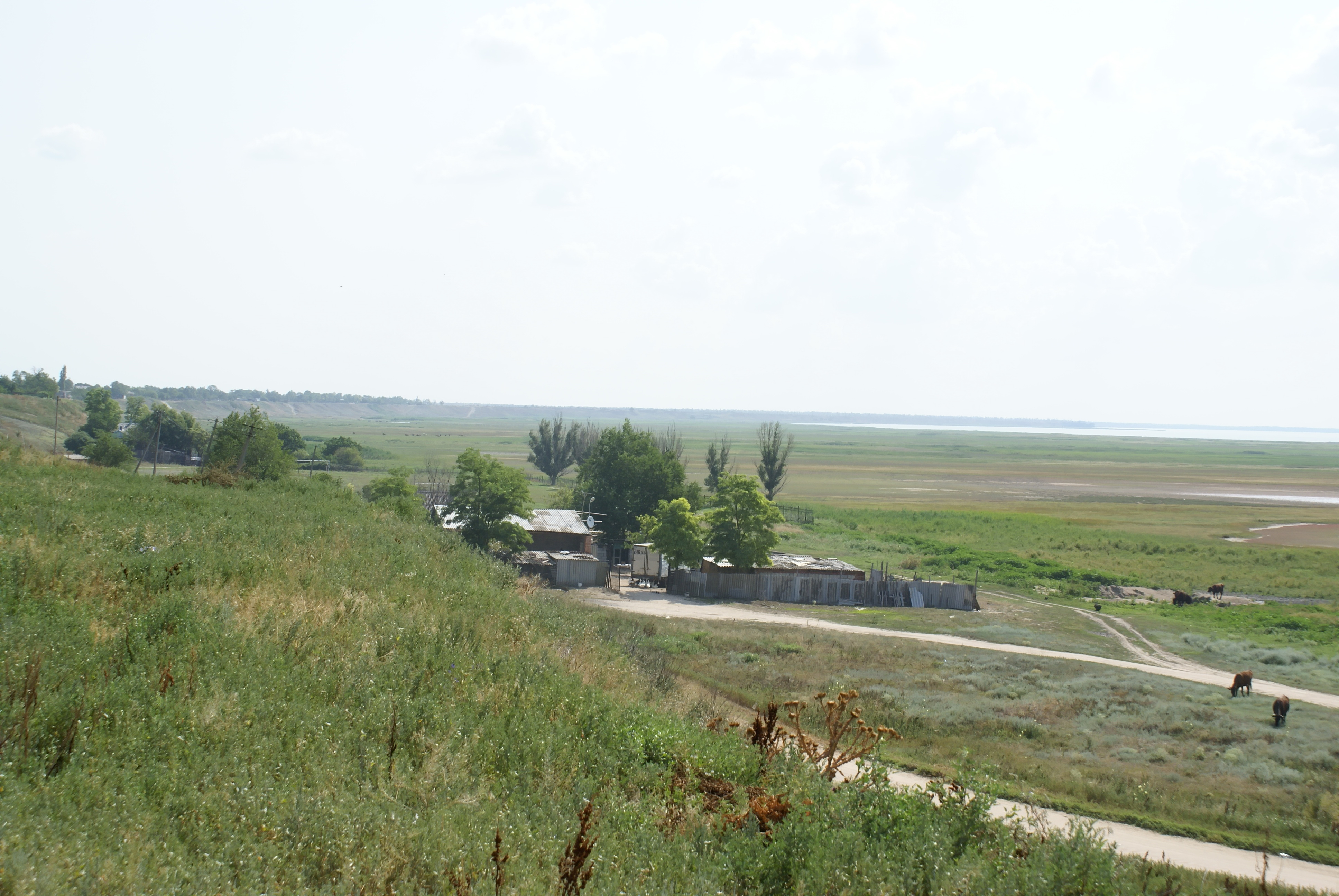 Yeysky District, Krasnodar Krai, Russia